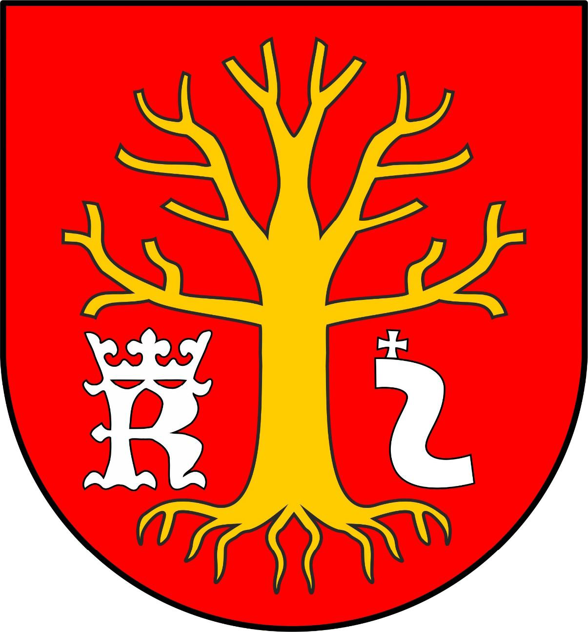 Herb gminy Osiek Jasielski